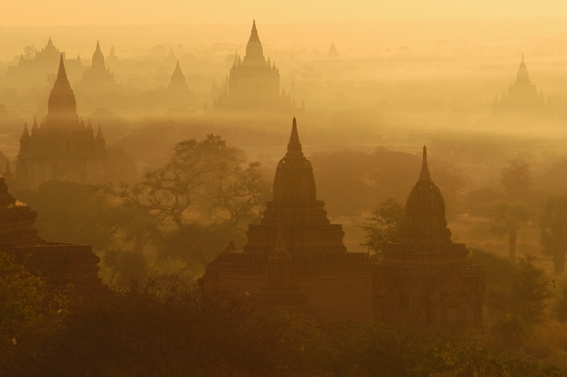 Bagan im Morgennebel